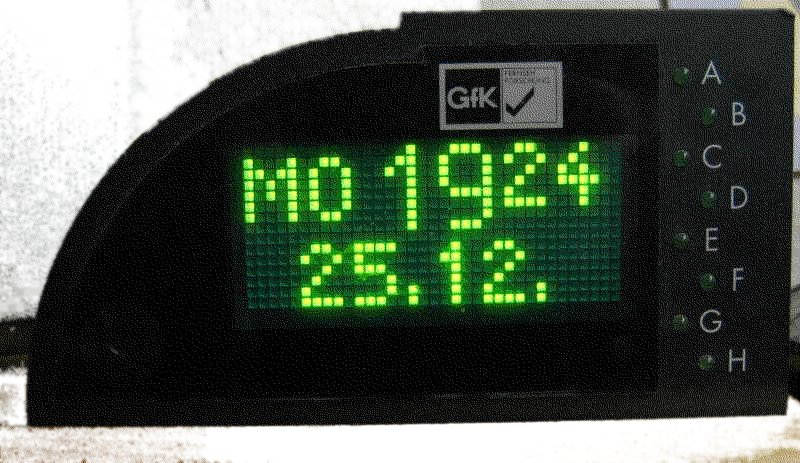 GfK-Meter, Messgerät für die sogenannte Einschaltquote